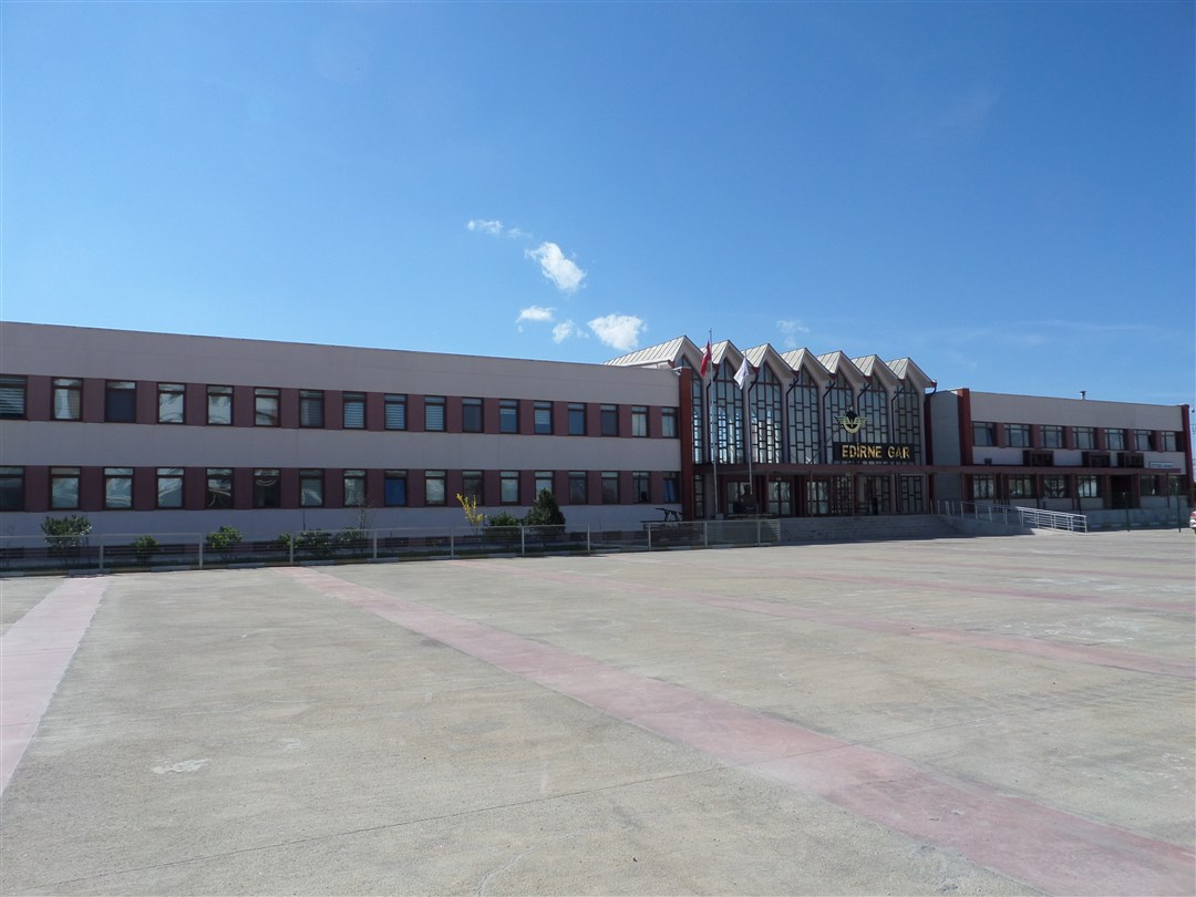 Edirne Gar